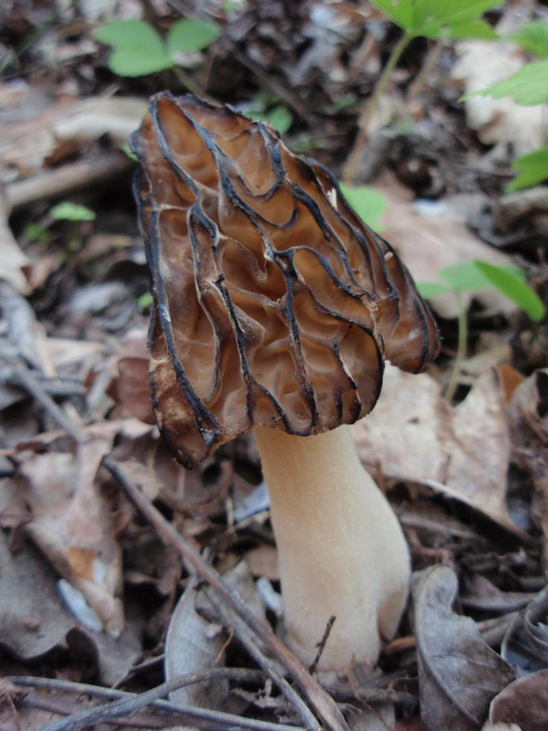 Smrž polovolný